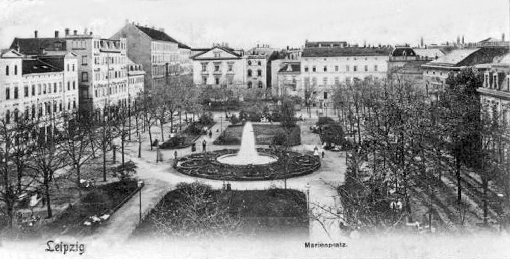 Der Marienplatz in Leipzig um 1900